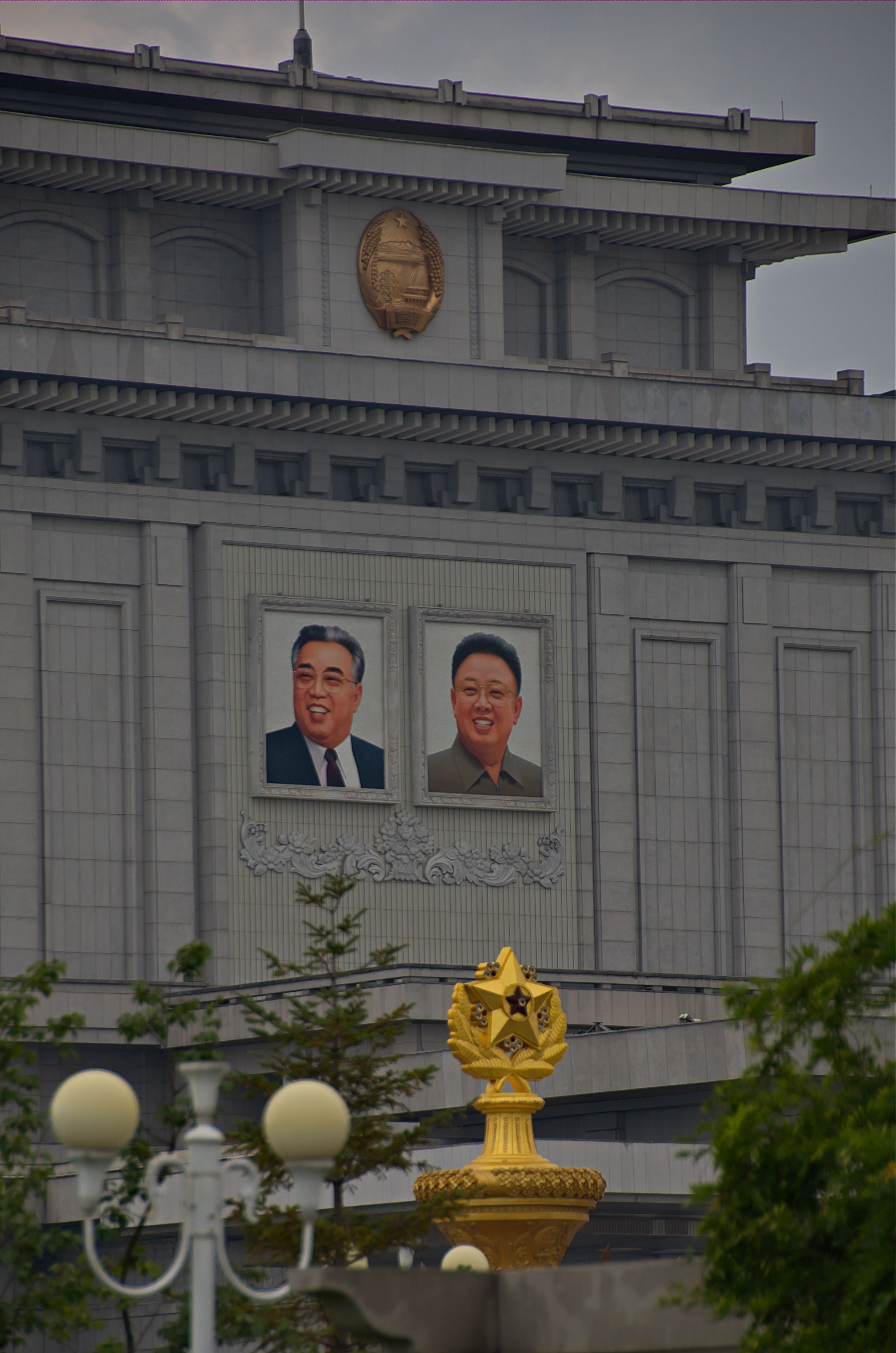 Nordkorea 2015 - Pjöngjang - Mausoleum